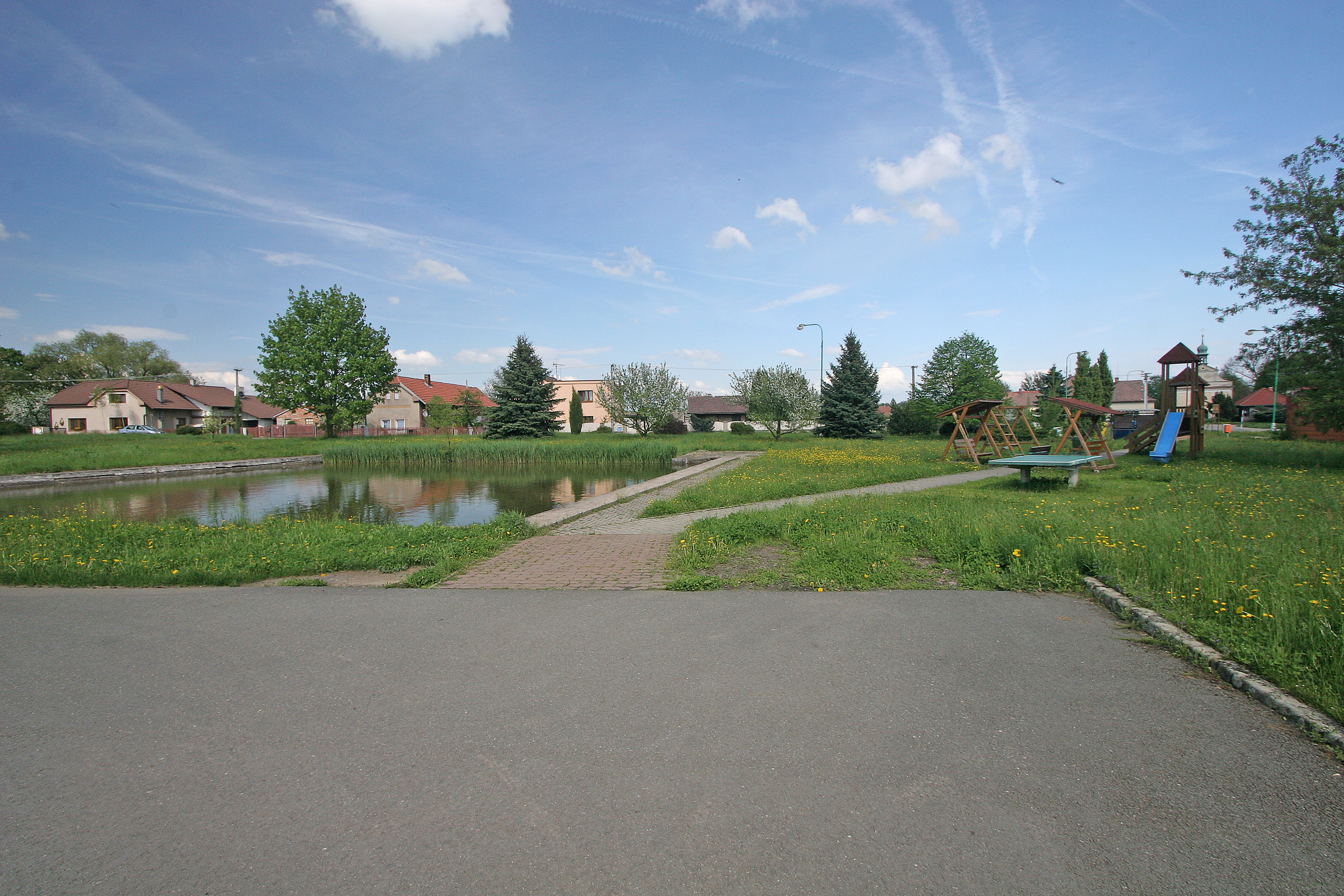 Újezd u Přelouče hřiště u rybníka na návsi